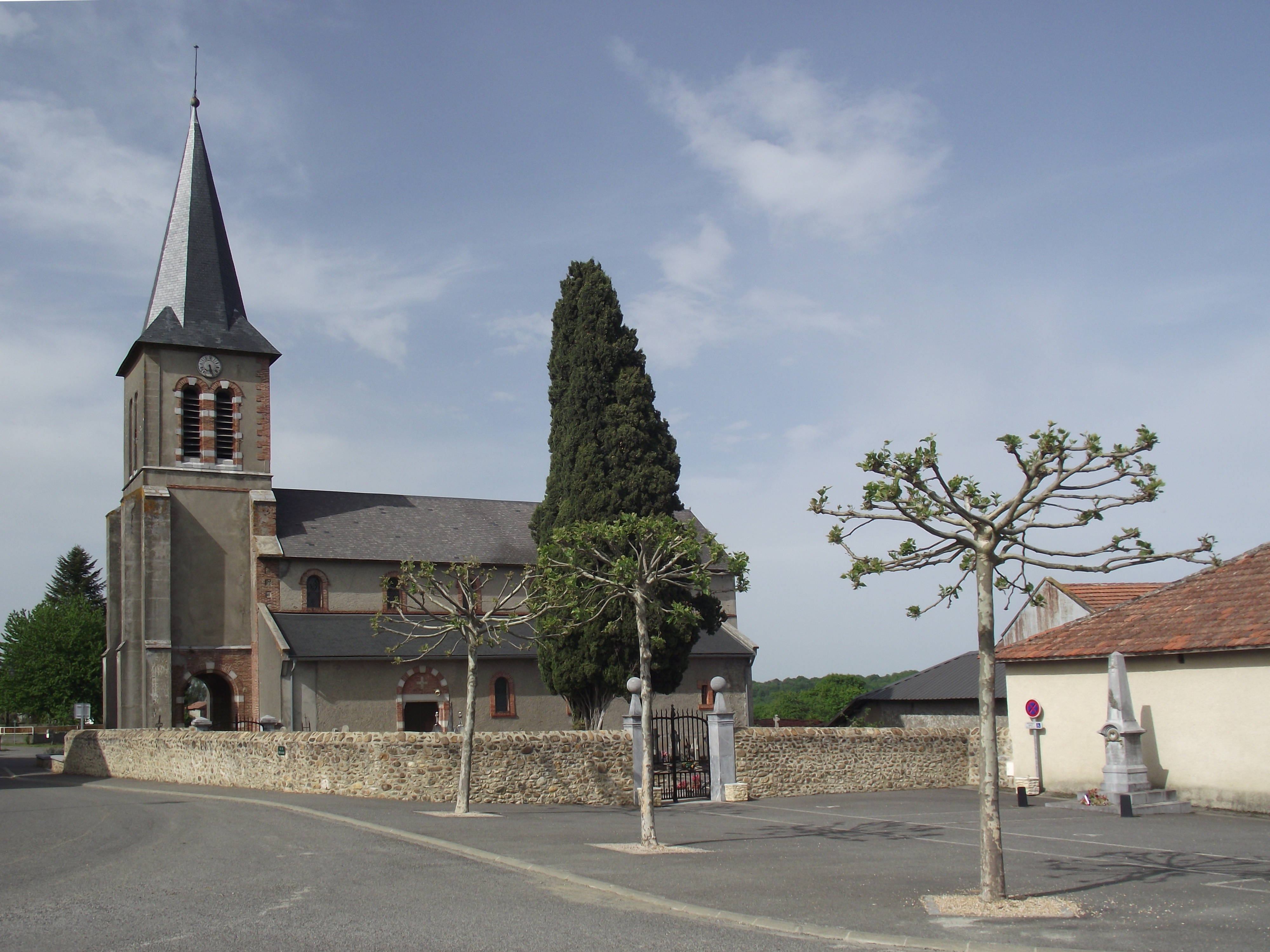 Église de Clarens (Hautes-Pyrénées, France)